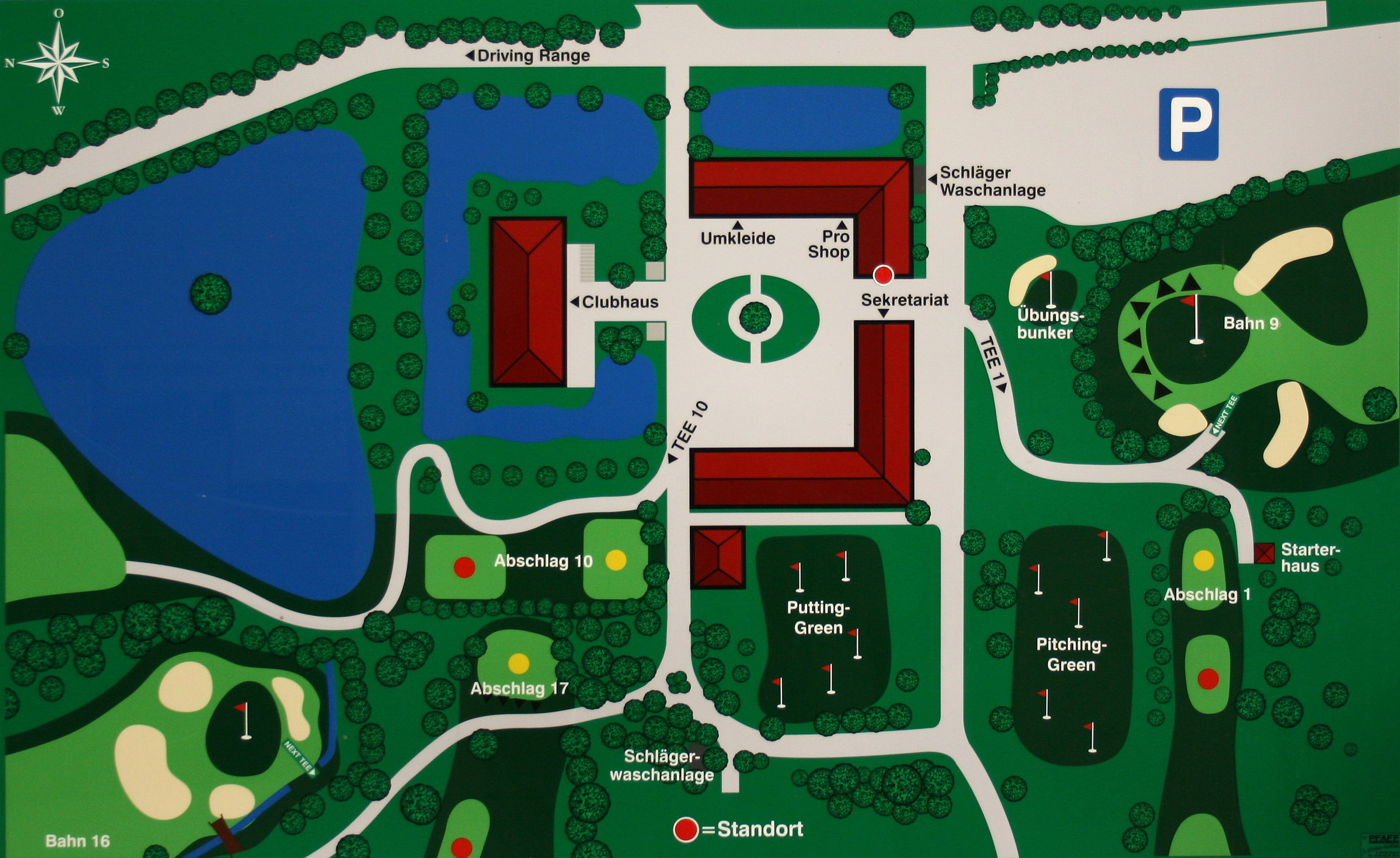 Lageplan des Schlosses Georghausen